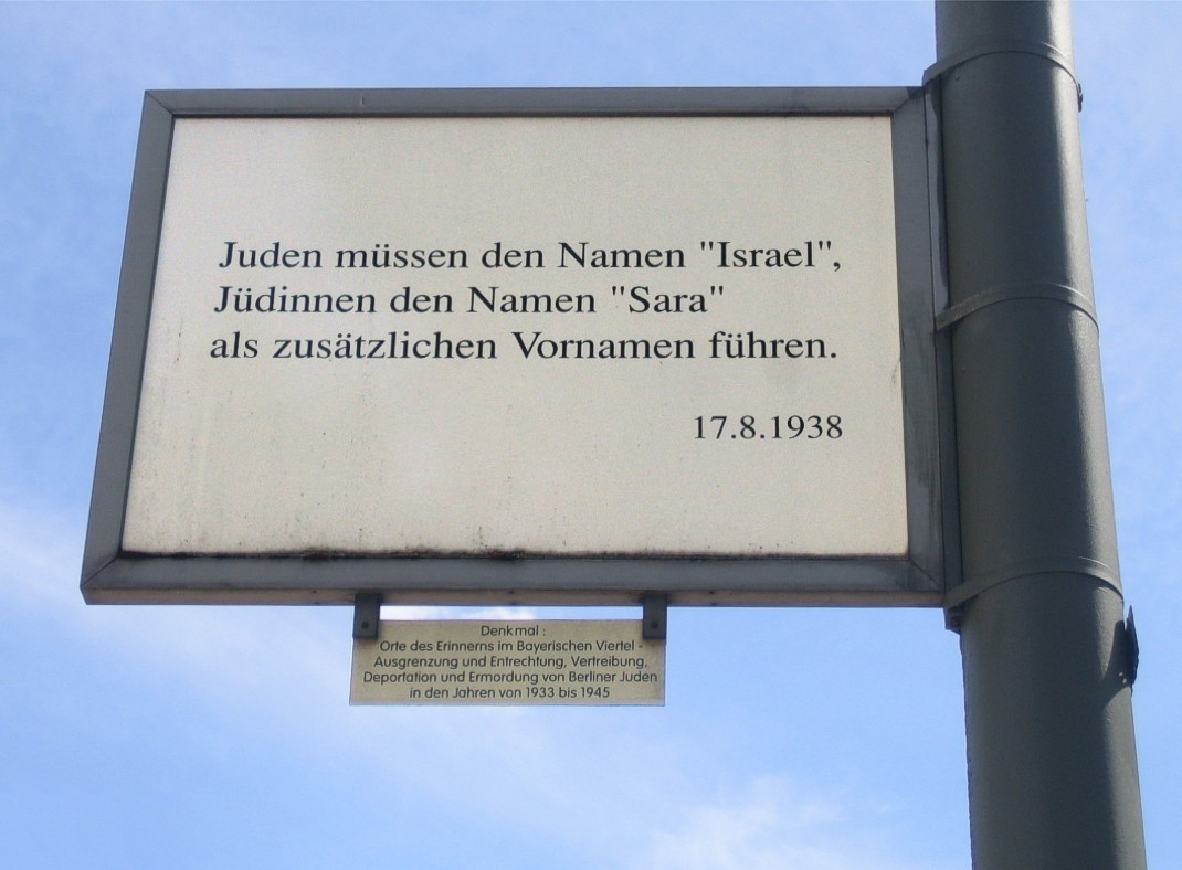 Berlin-Schöneberg, Bayerisches Viertel. Denkmal zur Erinnerung an die Unterdrückung der Juden 1933-1945. Tafel über erzwungene Vornamen auf Höhe der Münchener Straße 34–38.